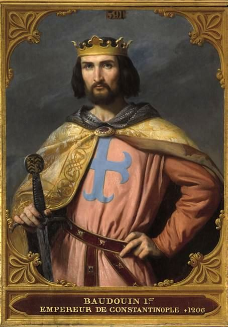 Балдуин Фландърски, император на Латинската Империя